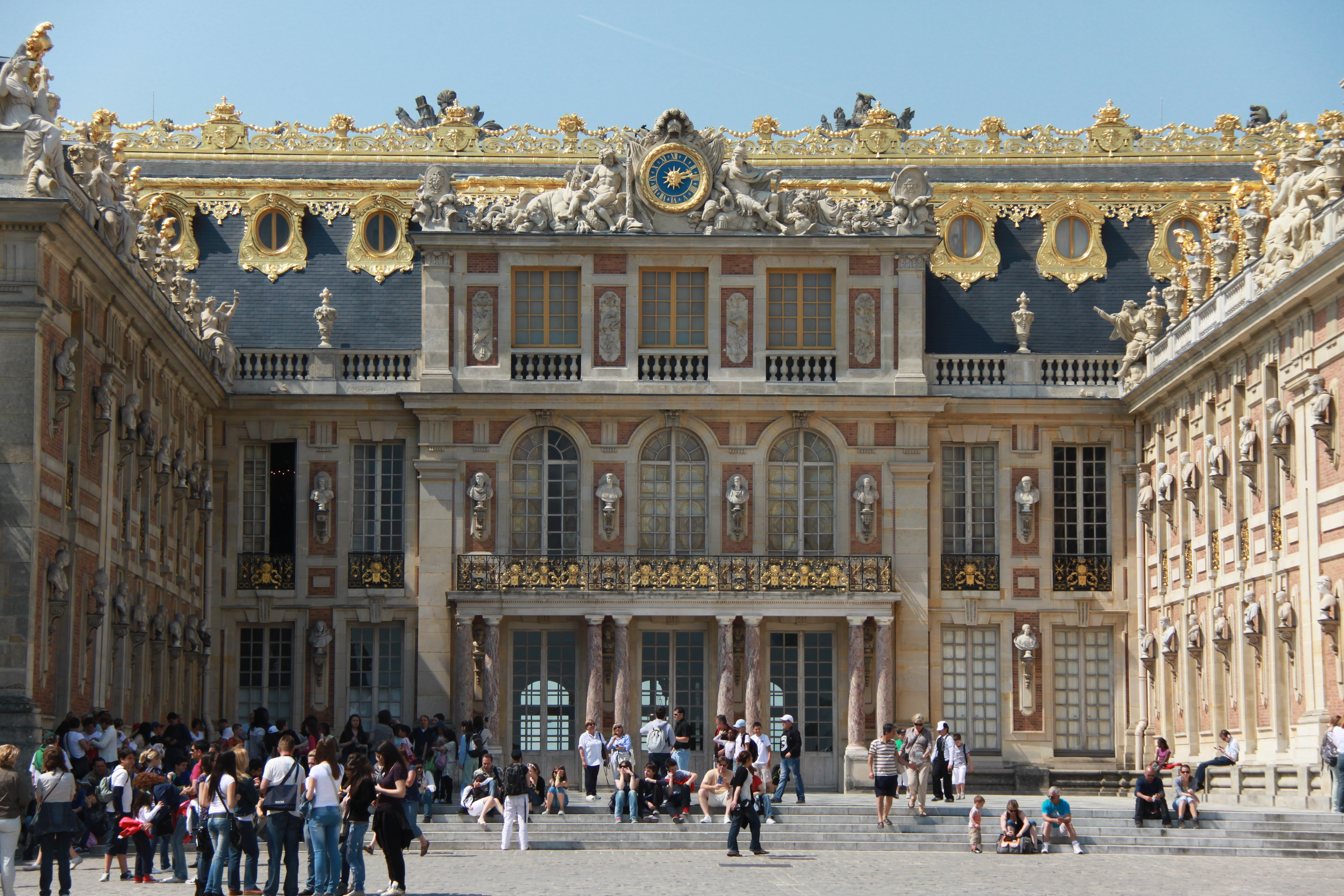 Inner cour d'honneur of Versailles